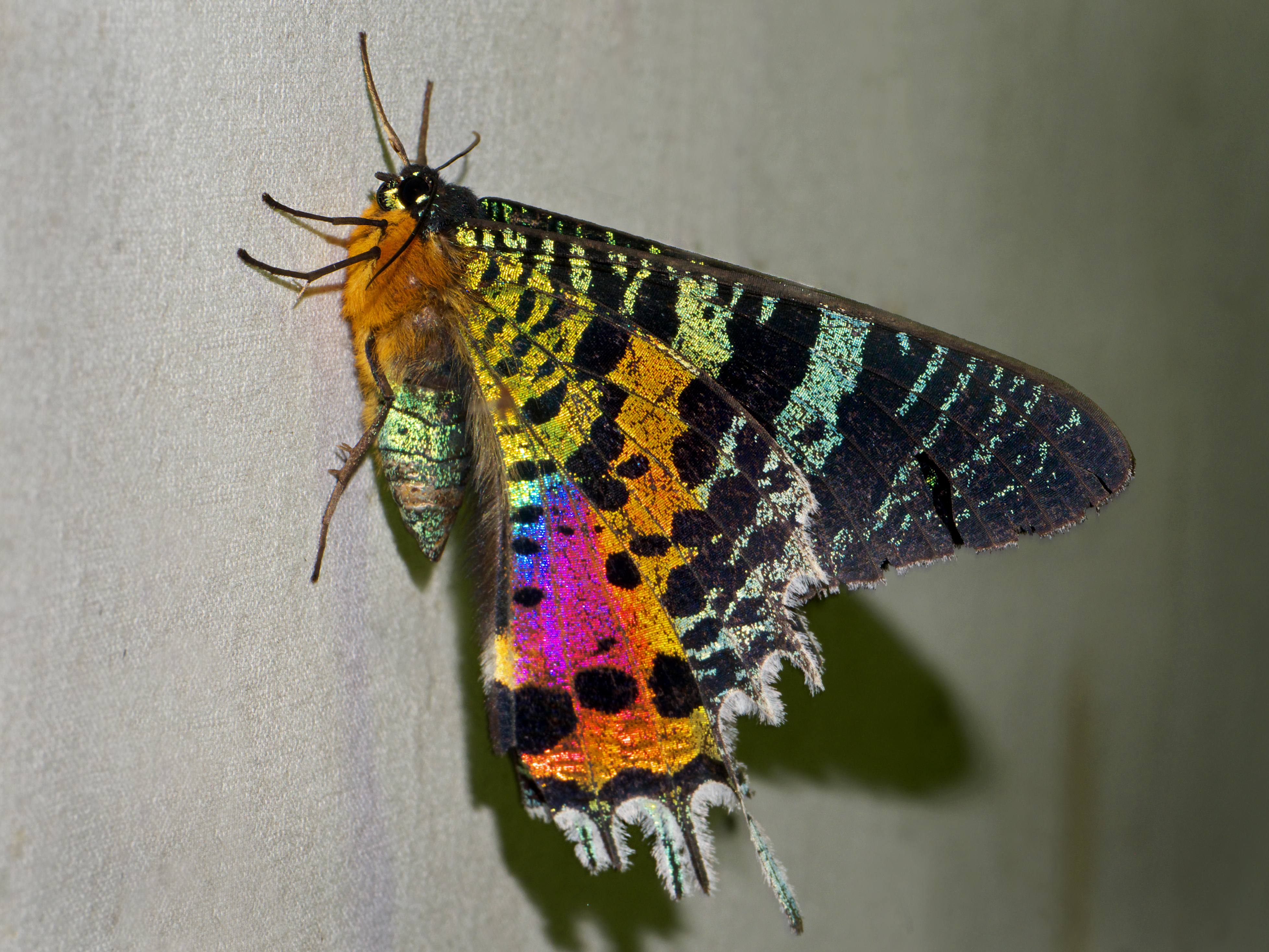 Panasonic GX7 + Leica DG Macro-Elmarit 45mm F2.8 ASPH OIS